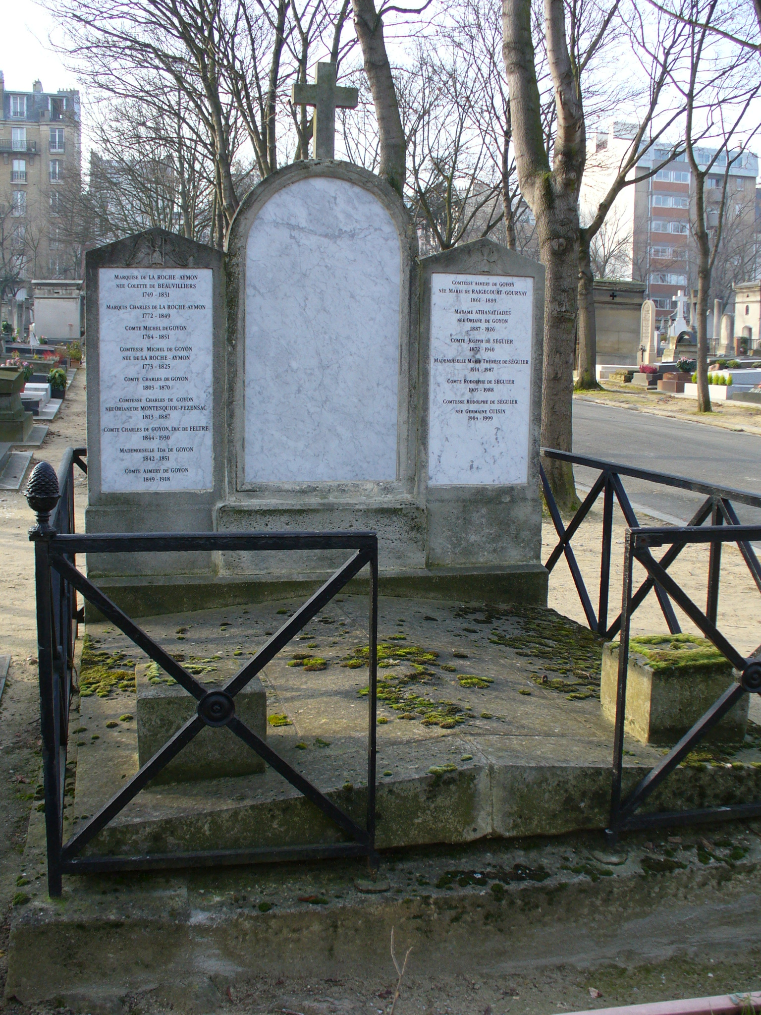 Tombe familiale Goyon, au cimetière Montparnasse, à Paris.